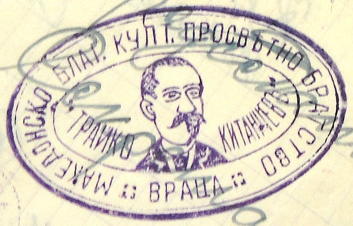 Печат на Врачанското македонско дружество "Трайко Китанчев".